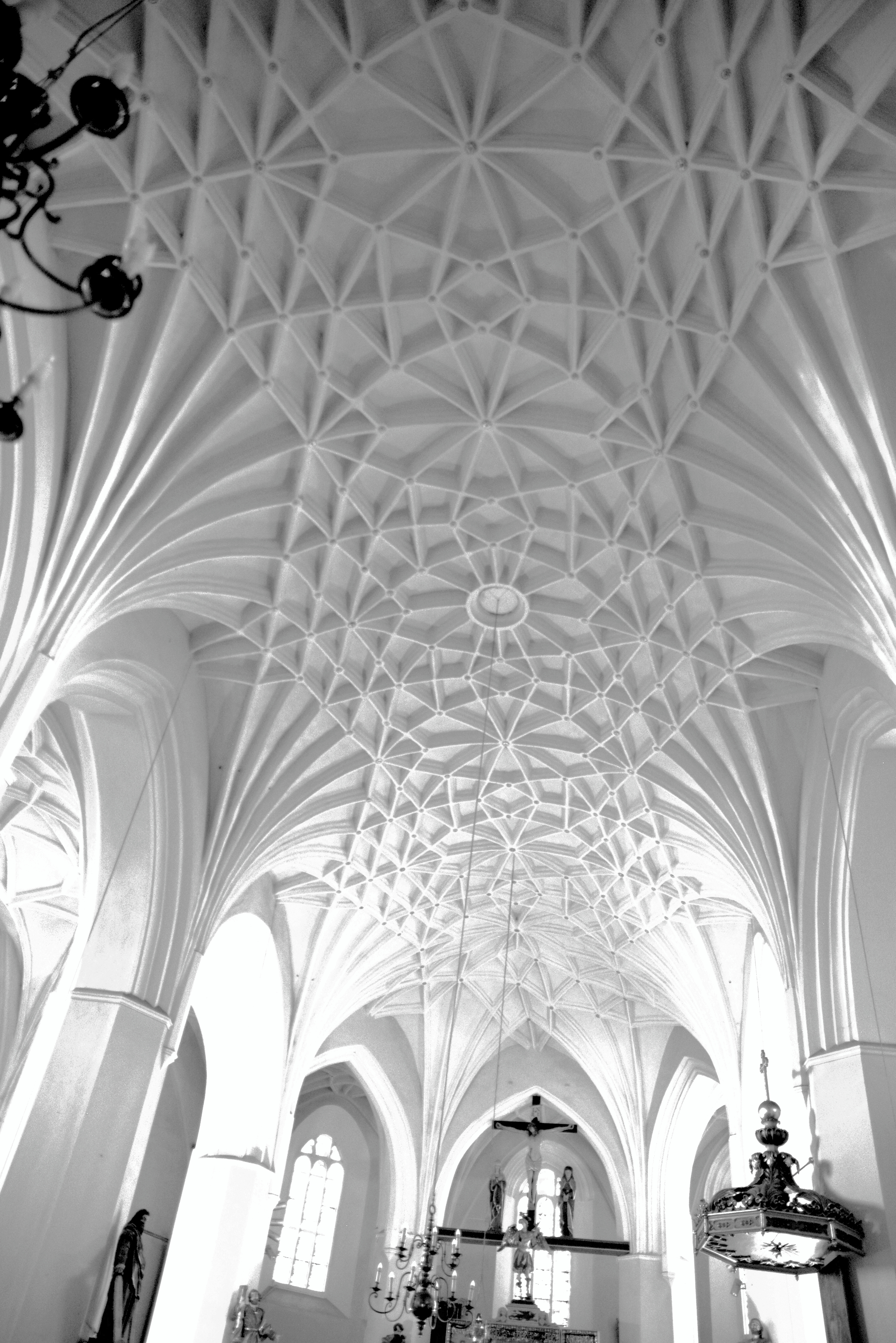 Kościół p.w. św. Michała Archanioła w Świebodzinie